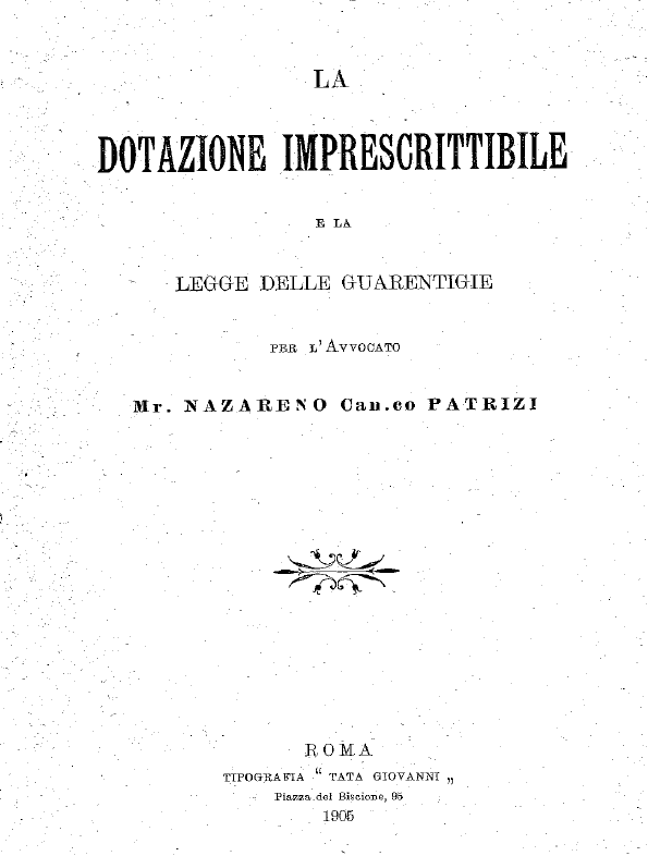 Nazareno Patrizi, "La dotazione imprescrittibile e la legge delle guarentigie", Roma 1905 (frontespizio). Testo di diritto pubblico ecclesiastico in difesa delle garanzie dovute dallo Stato Italiano alla Santa Sede dopo l'unità d'Italia.